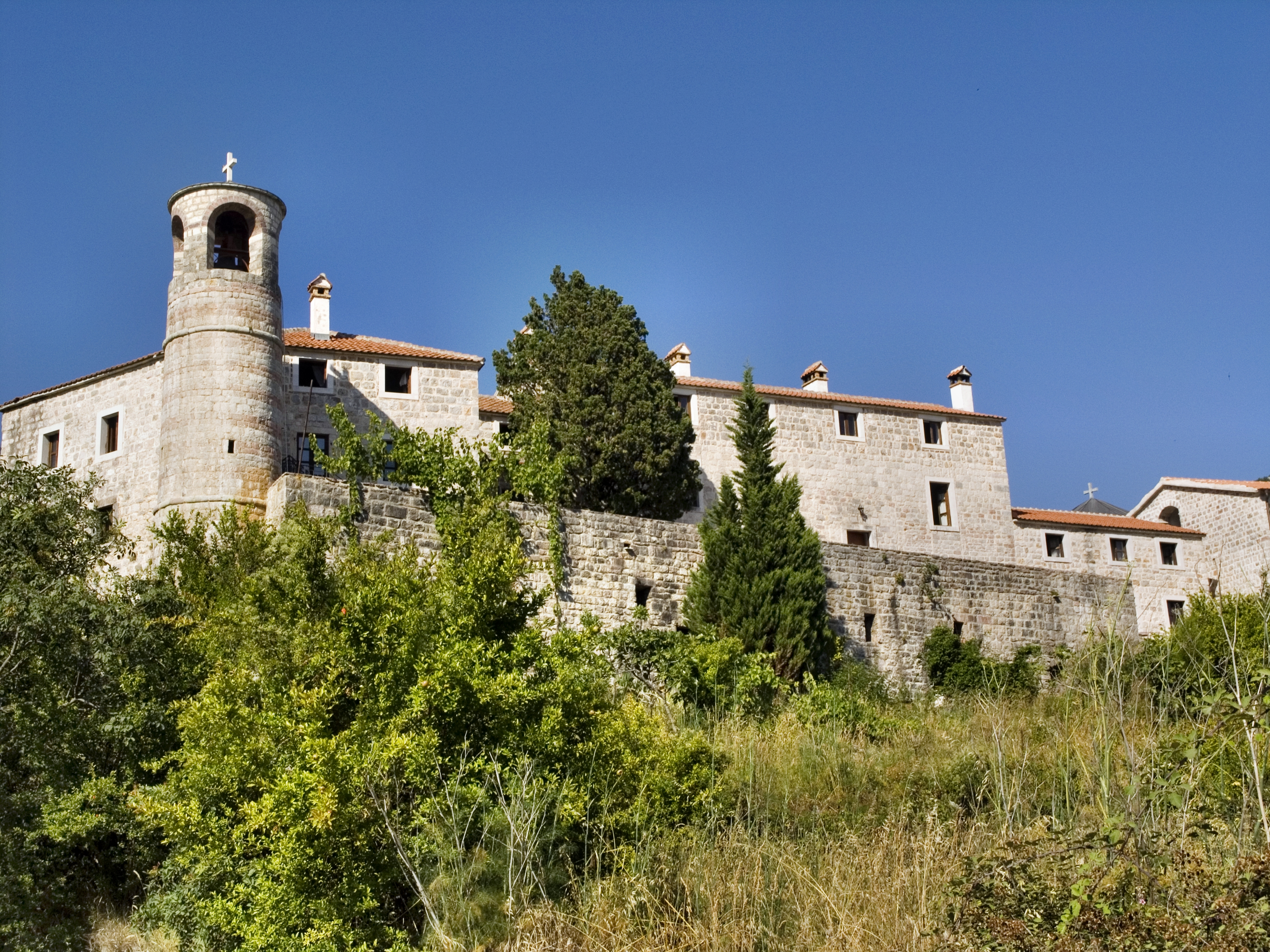 Черногория, Будва - монастырь Подмаине